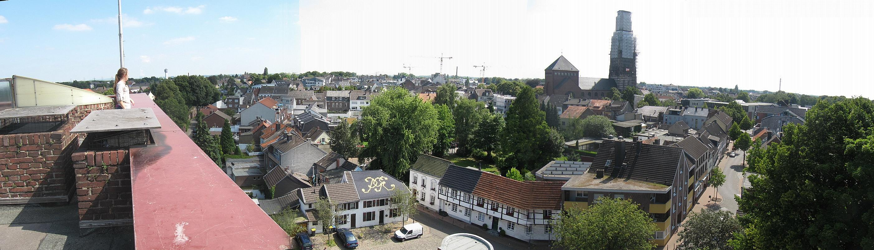 Panoramablick vom Burgturm, Erkelenz, NRW, D